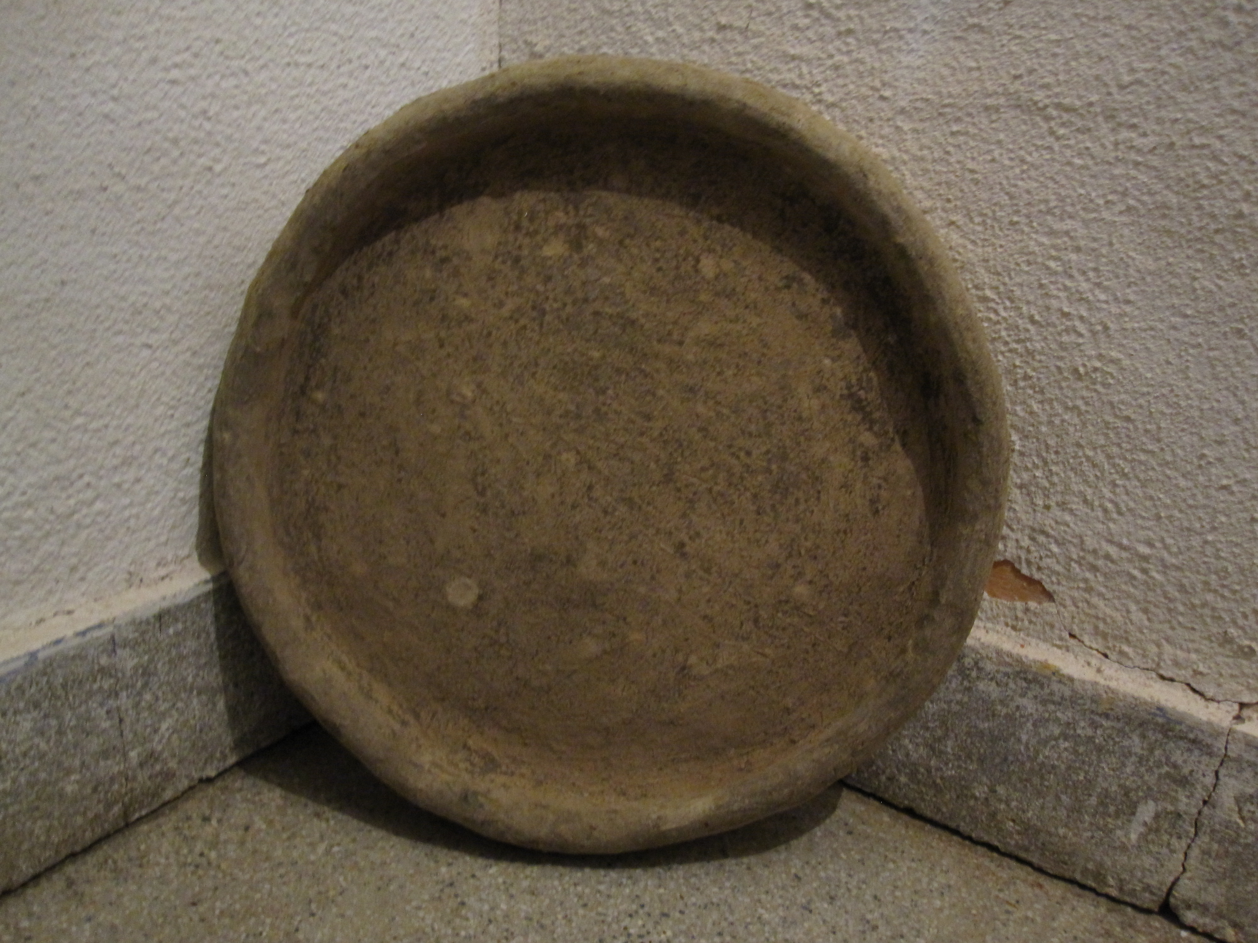 Црепна - земјен предмет за печење.